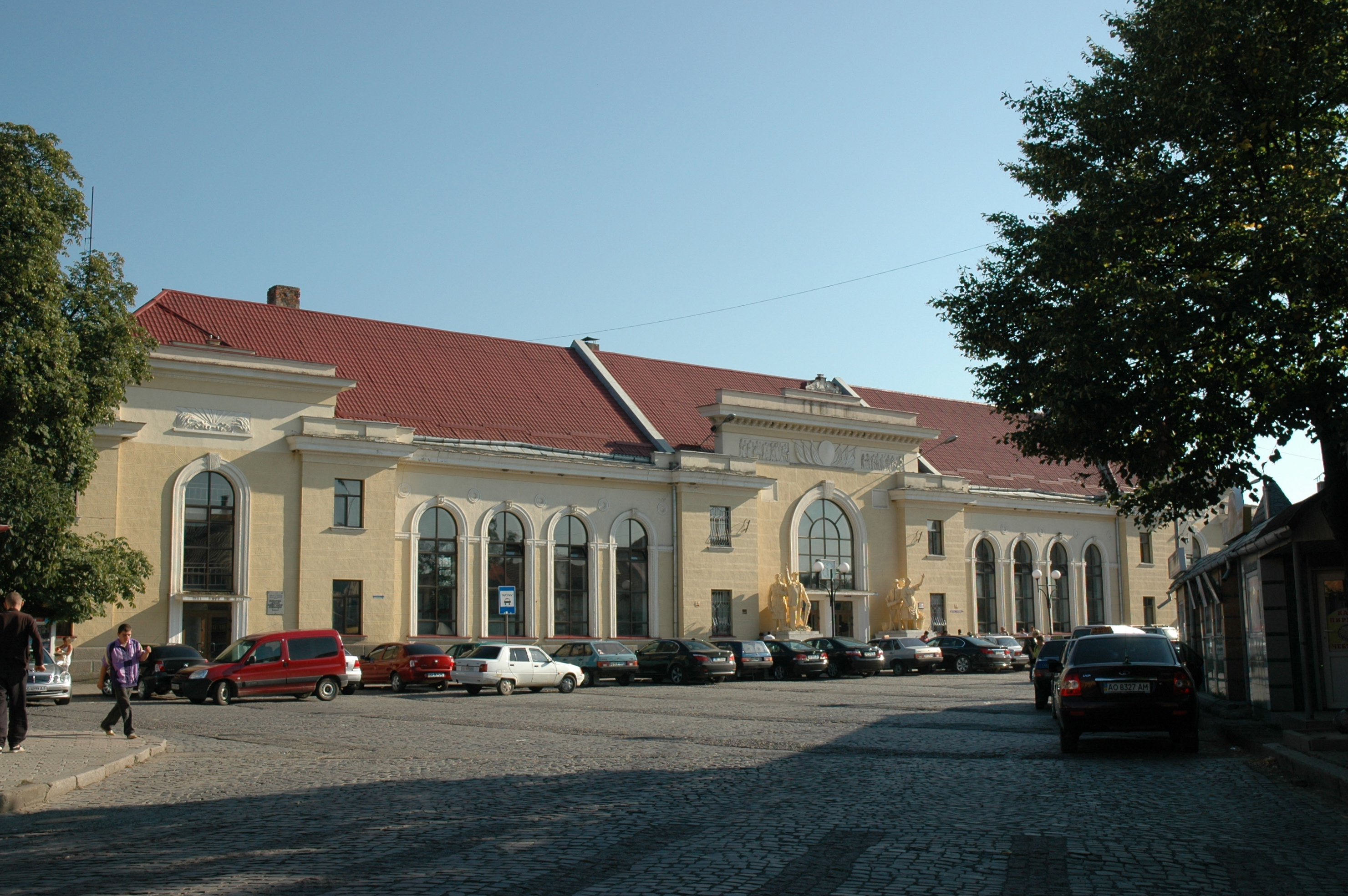 The railway station in Mukacheve (Zakarpats'ka oblast, Ukraine)